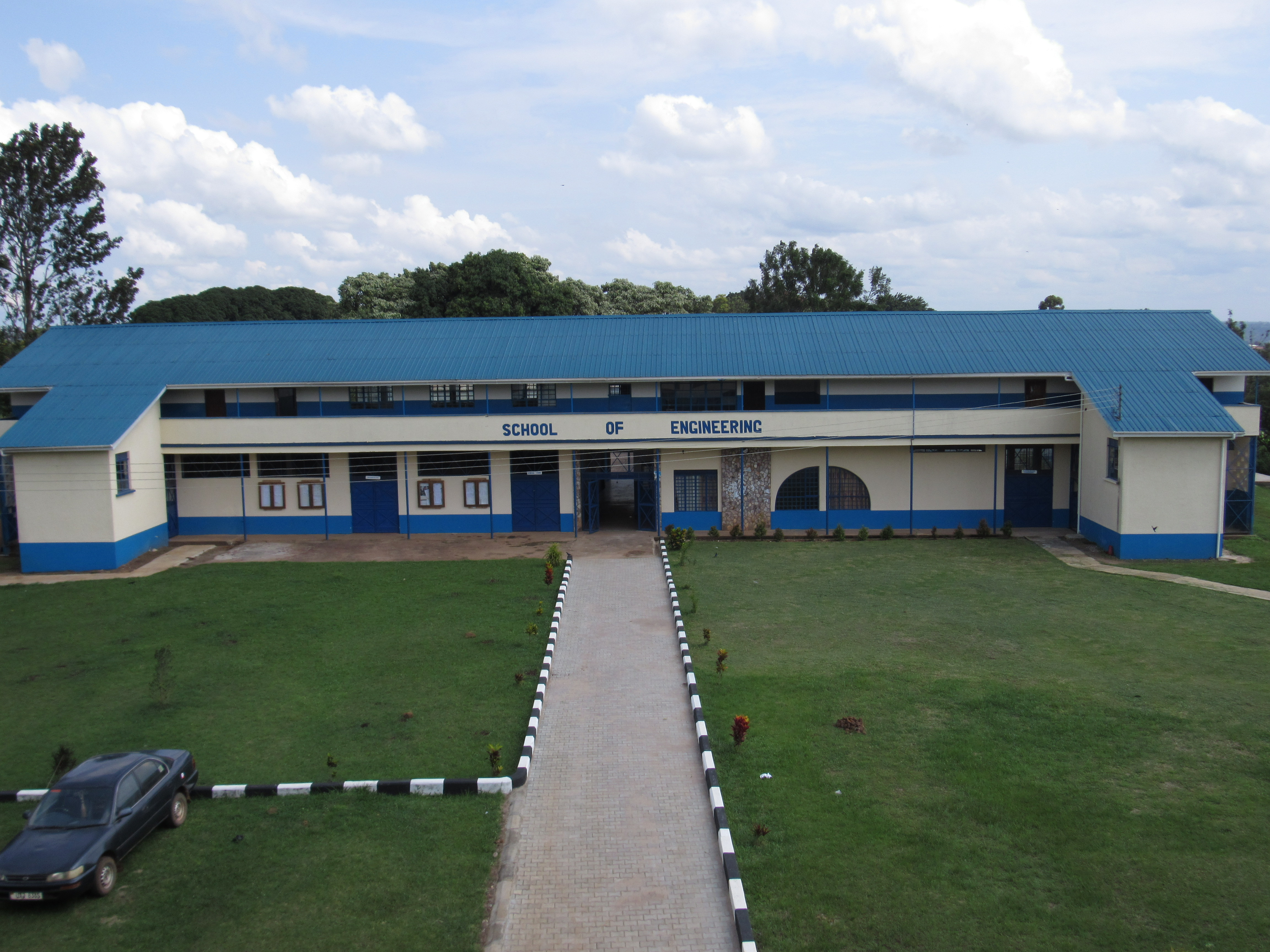 Luganda: Ebimu ku bizimbe e Kirumba.